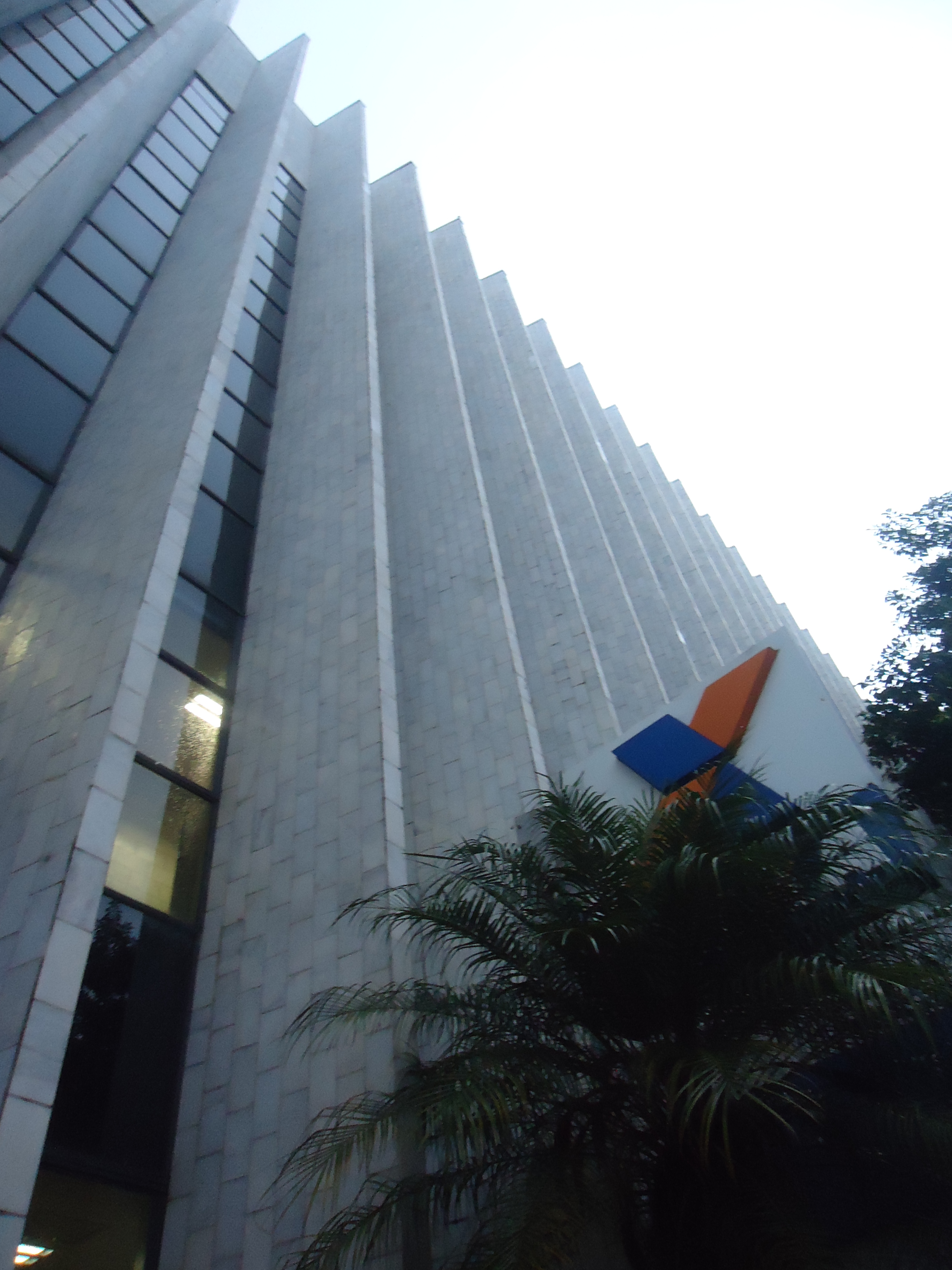 Agência Caixa da praça Oswaldo Cruz, no Centro de Uberlândia.